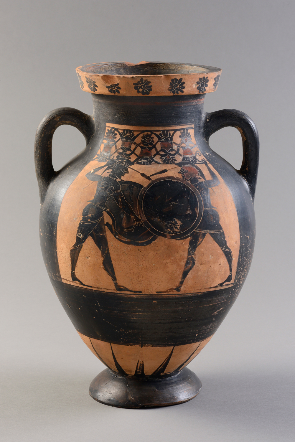 Face B d'une amphore attique à figures noires, représentant un combat d'hoplites.